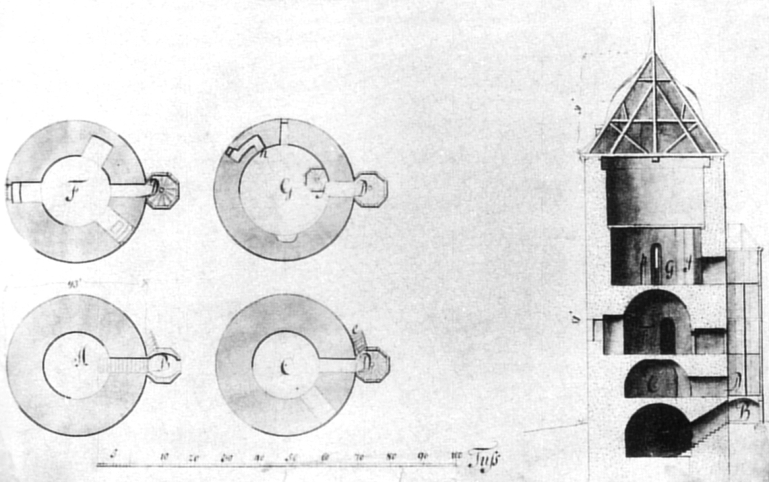 Schnitt durch den Waldemarturm und vier Geschosse, Nr. G ist das als Gefängnis genutzte dritte Geschoss mit Abtritt und Kamin